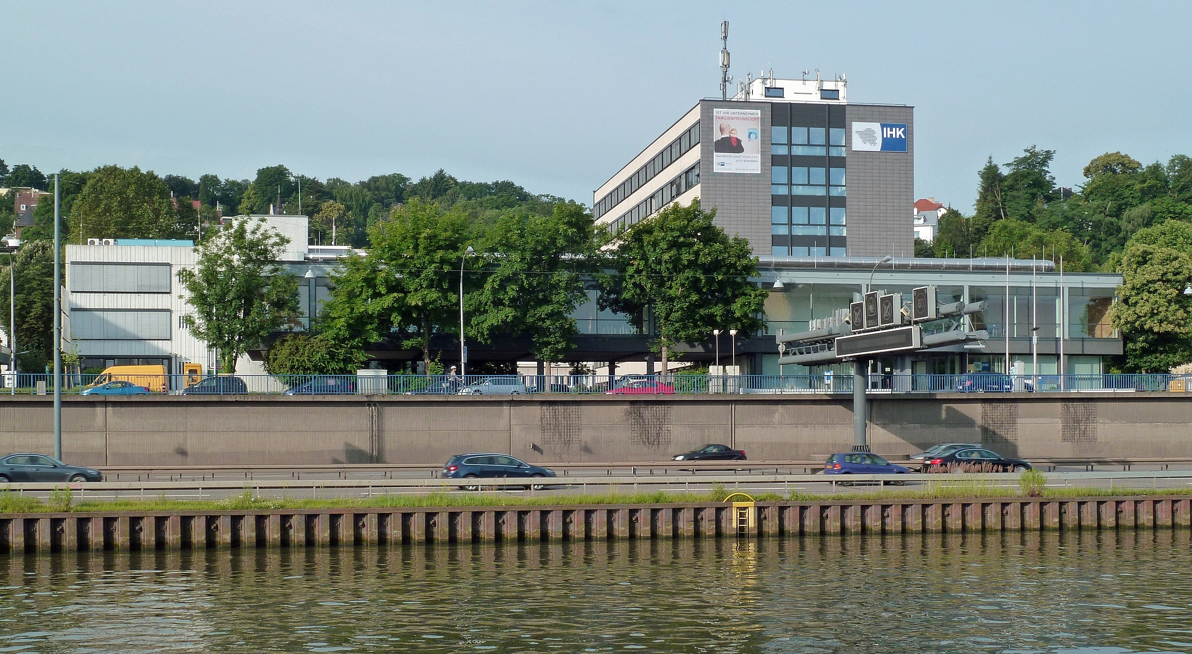 Die Industrie- und Handelskammer des Saarlandes in der Franz-Josef-Röder-Straße 9, Saarbrücken